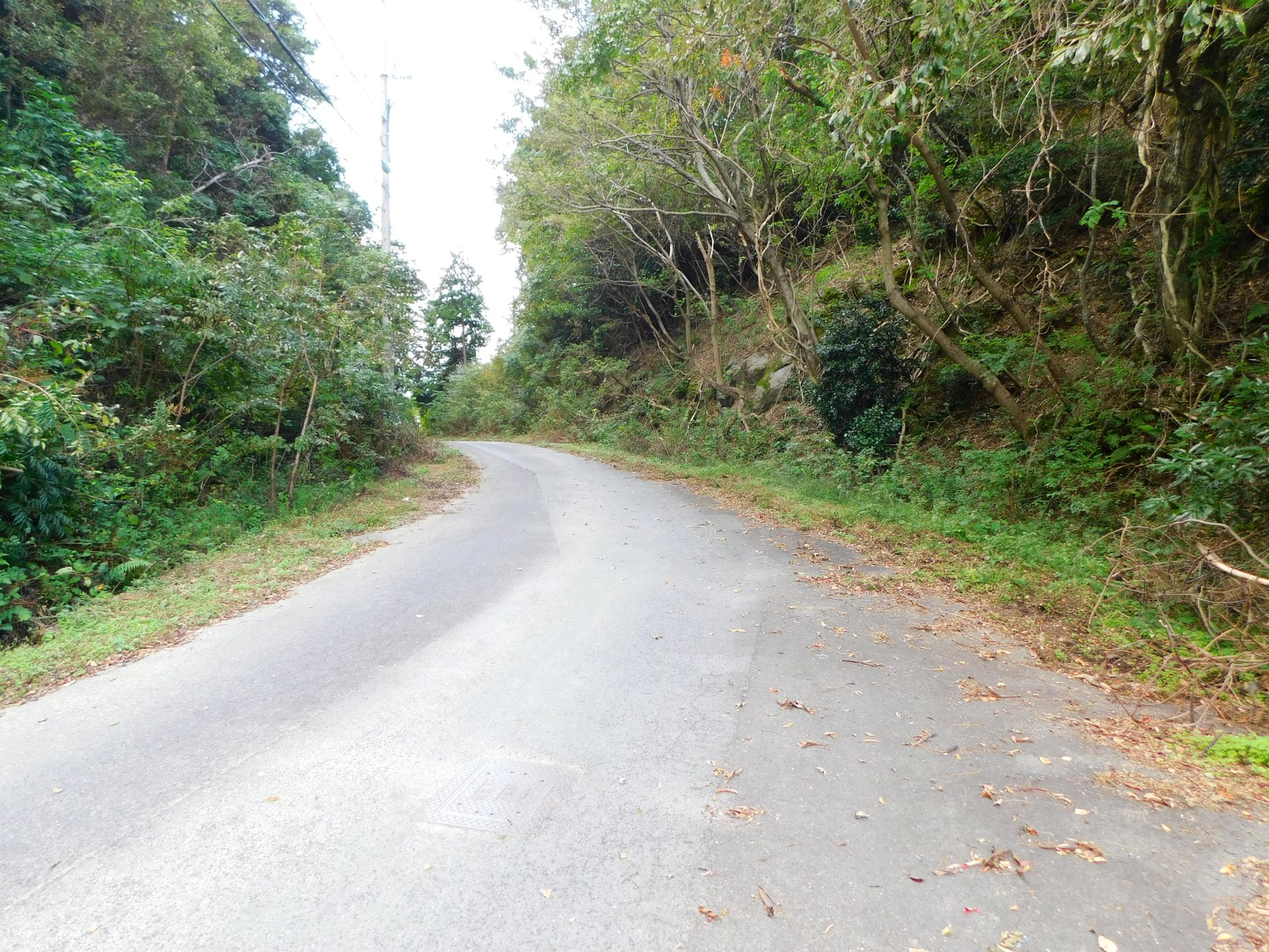 福井県小浜市の青井と東勢を分ける峠。